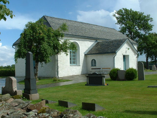 Järns kyrka i Melleruds kommun, Dalsland